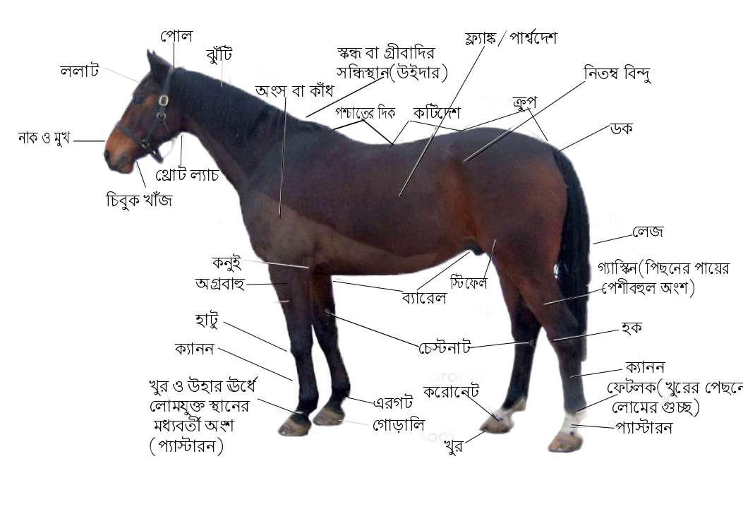 ছবিতে ঘোড়ার অঙ্গপ্রত্যঙ্গের নামগুলি